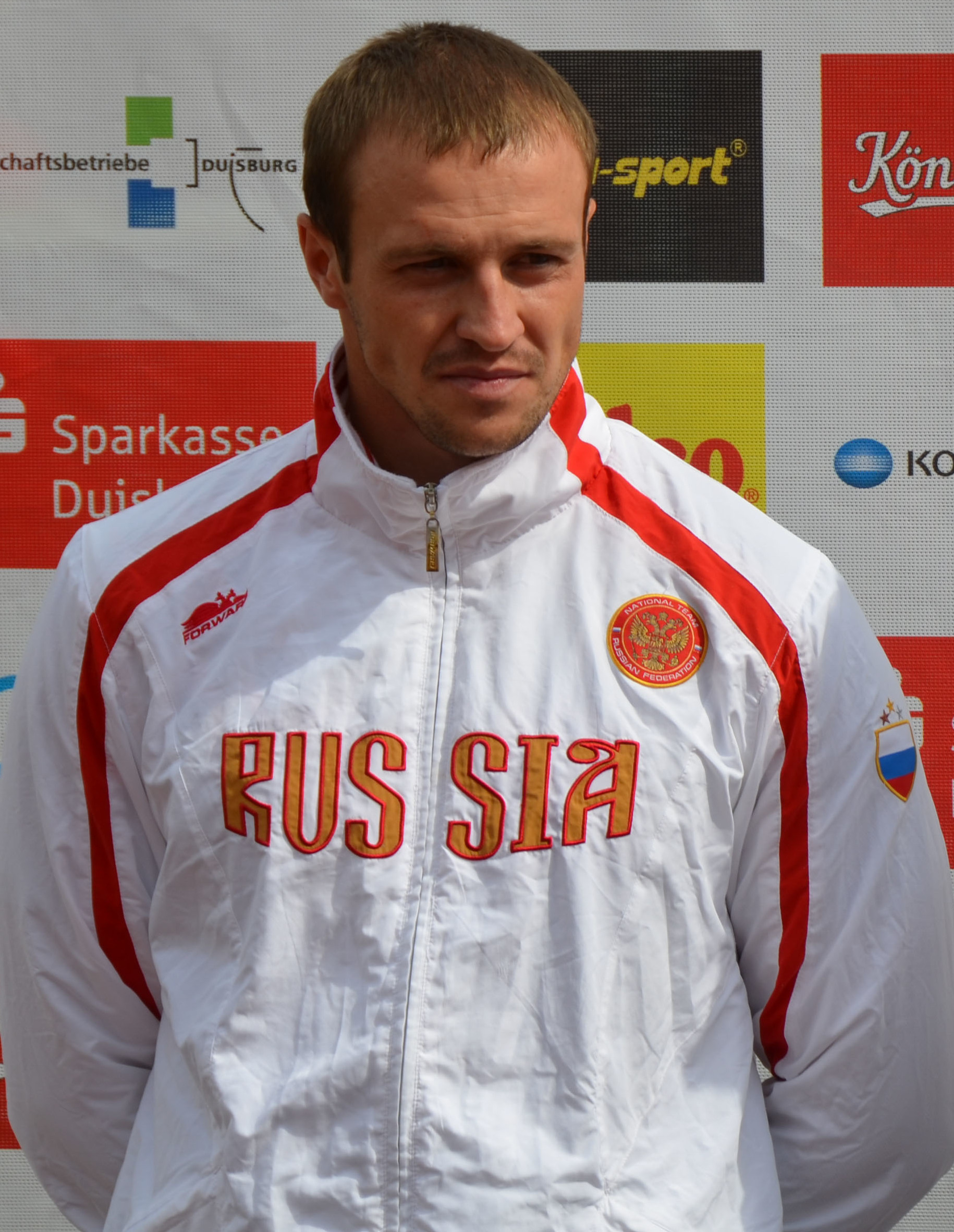 2013 ICF Canoe Sprint World Championships in Duisburg - Alle Ergebnisse/Teilnehmer unter: Gewinner: GER - GERMANY NUCK, Robert und HOLTZ, Stefan RUS - RUSSIA KOVALENKO, Alexander und LIPKIN, Nikolay BLR - BELARUS RABCHANKA, Dzmitry und VAUCHETSKI, Aliaksandr